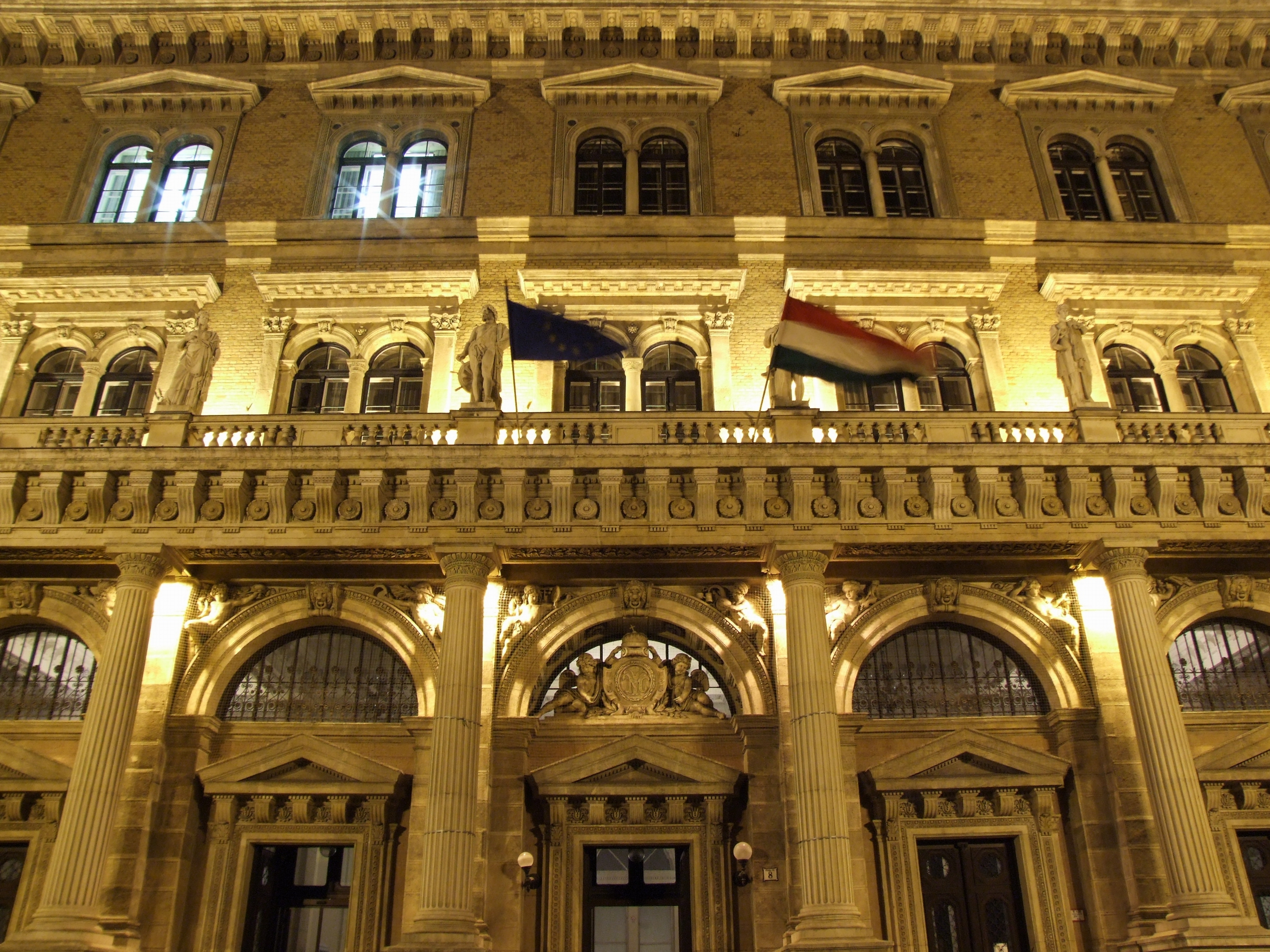 A Budapesti Corvinus Egyetem főépületének homlokzata éjszakai megvilágításban. The face of Corvinus University of Budapest main building at night. Budapest, Hungary.